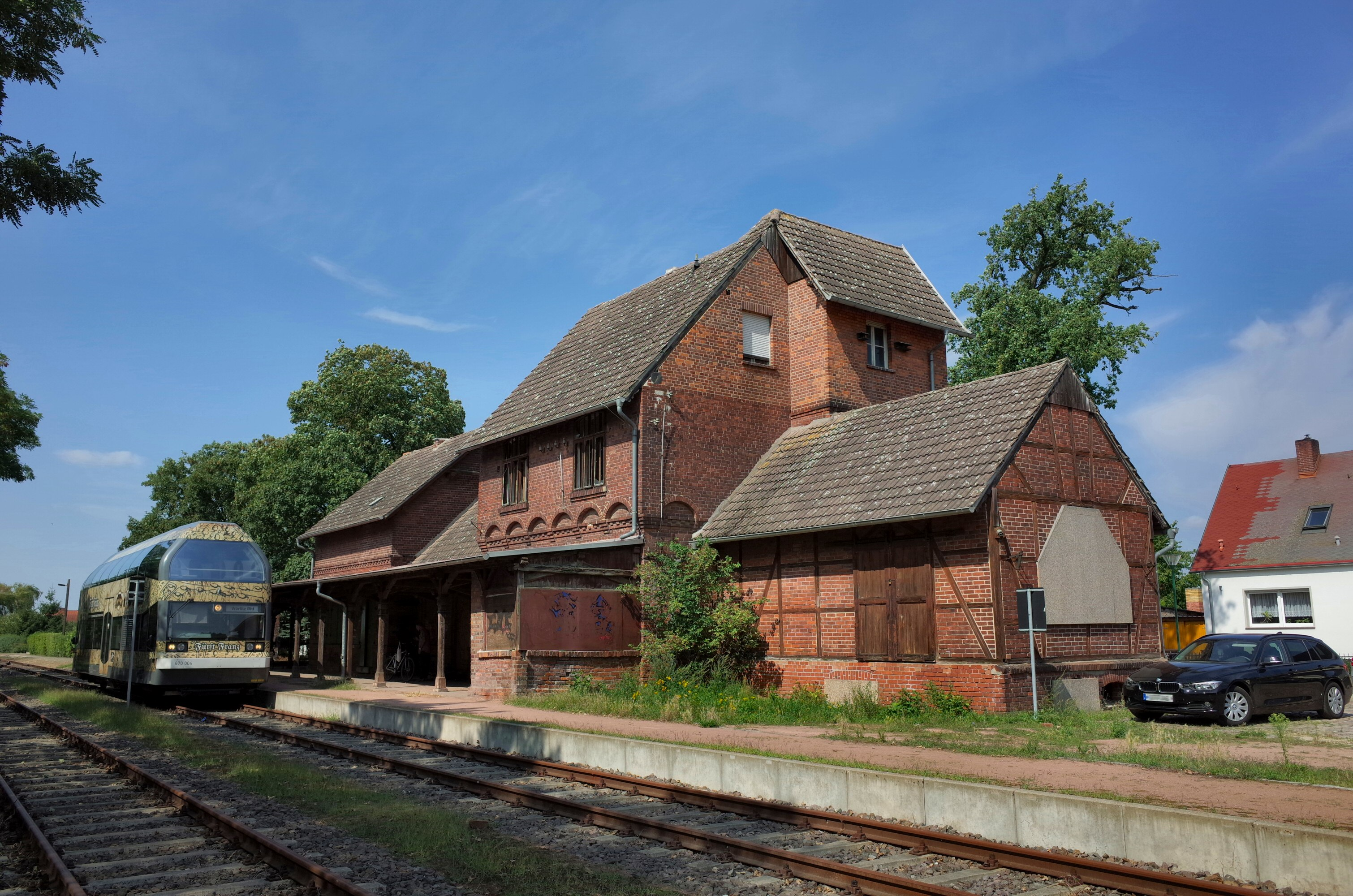 Oranienbaum-Wörlitz, Bahnhof in Wörlitz, Schienenbus Fürst Franz (Baudenkmal im Denkmalverzeichniss Sachsen-Anhalt, Erfassungsnummer: 094 40014 000 000 000 000 [1])